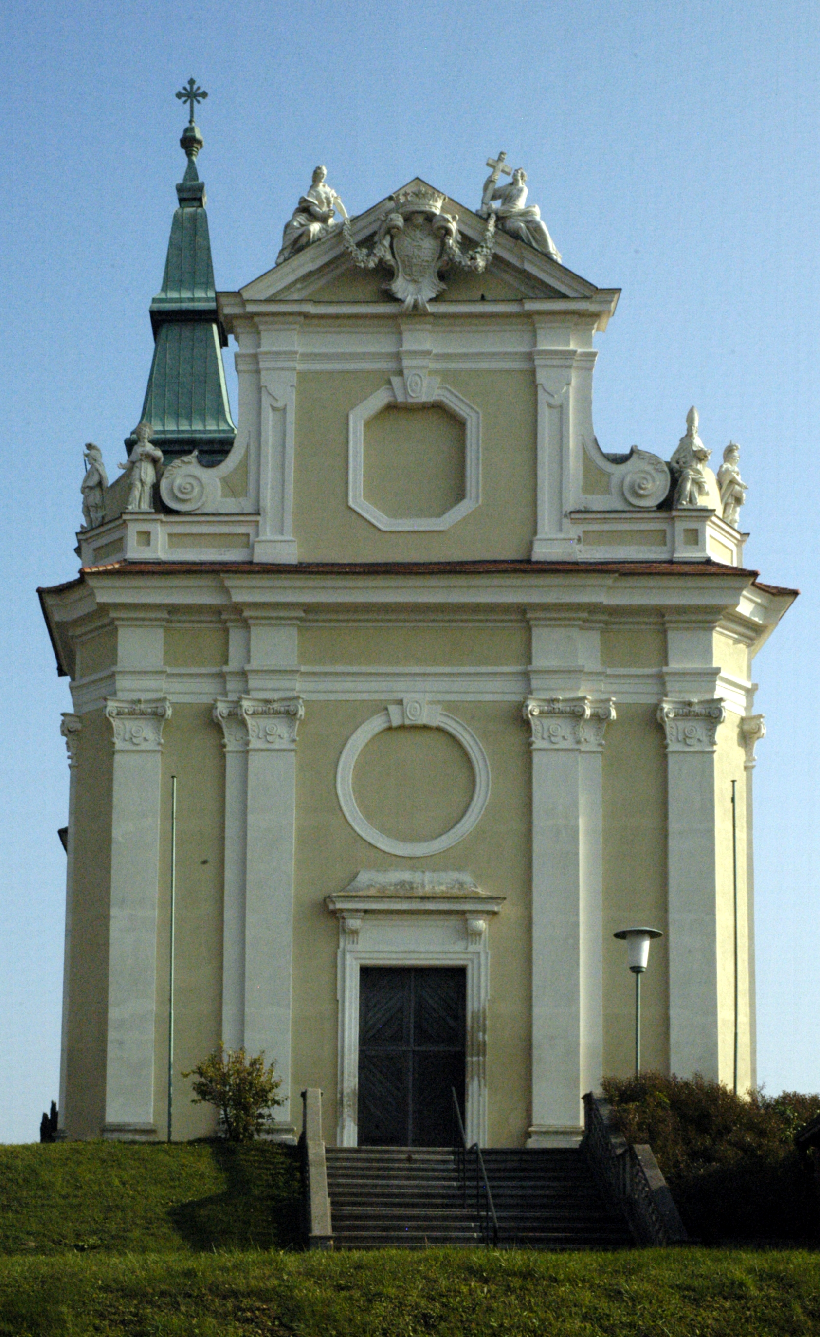 katholische Pfarrkirche heiliger Georg in Aspersdorf, Gemeinde Hollabrunn